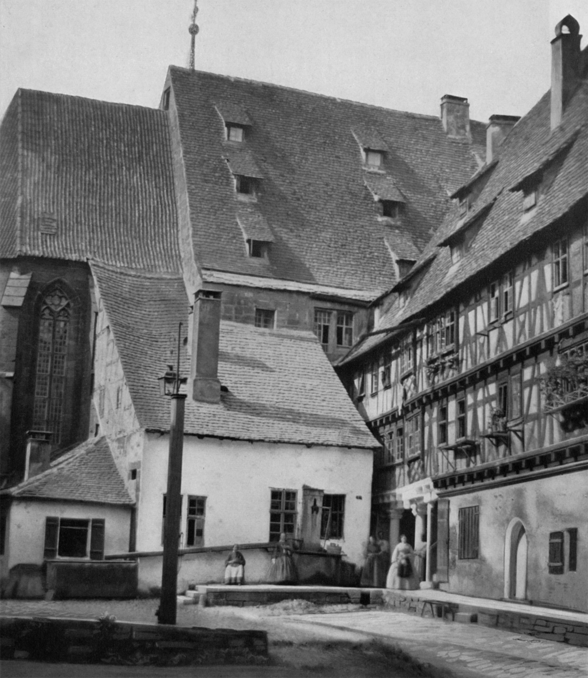 Innenhof des Katharinenspitals in Heilbronn 1868